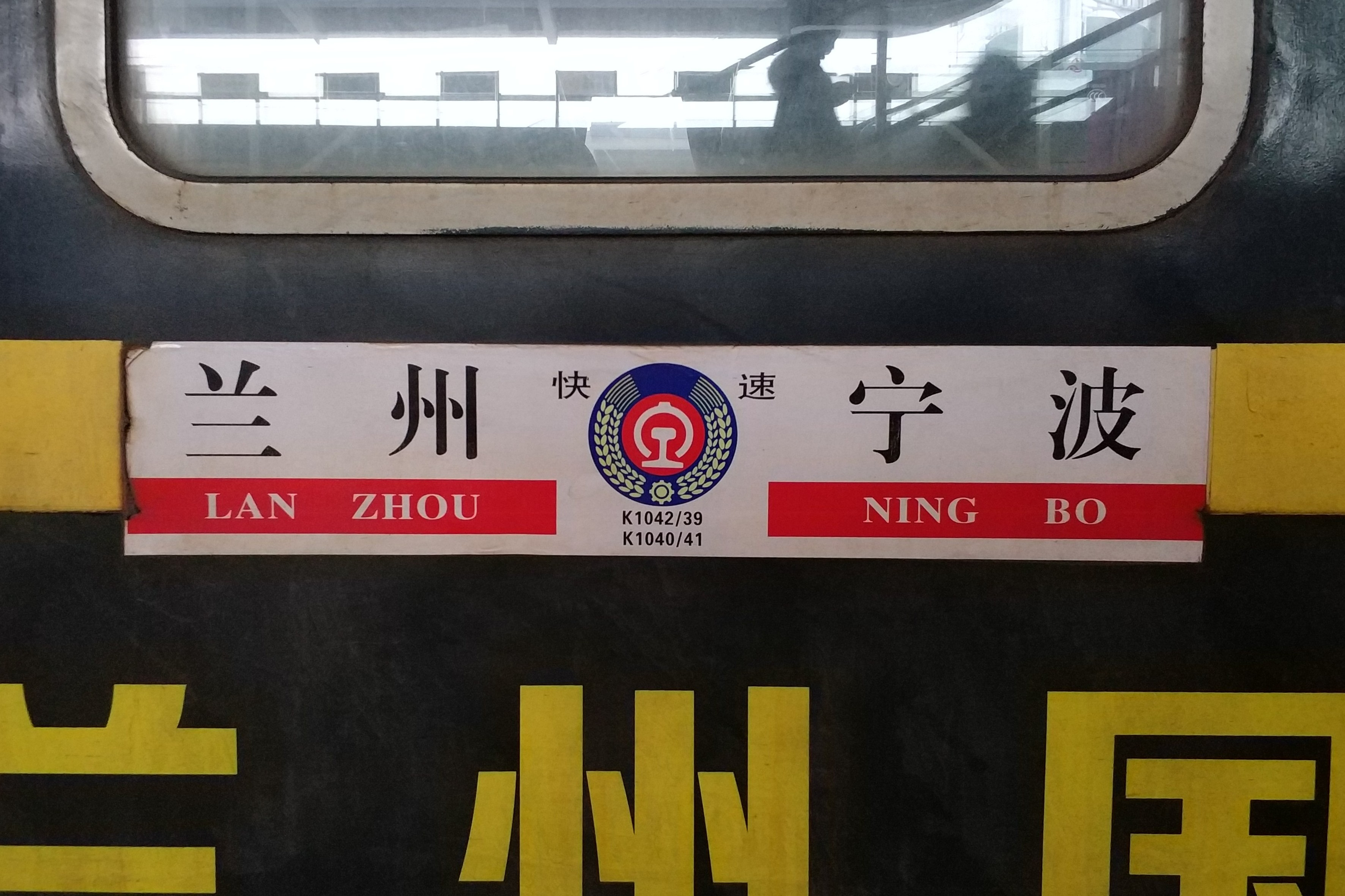 K1039/1042 水纸